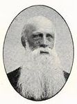 Swedish clergyman Erik Anders Stenborg (1827-1909)i